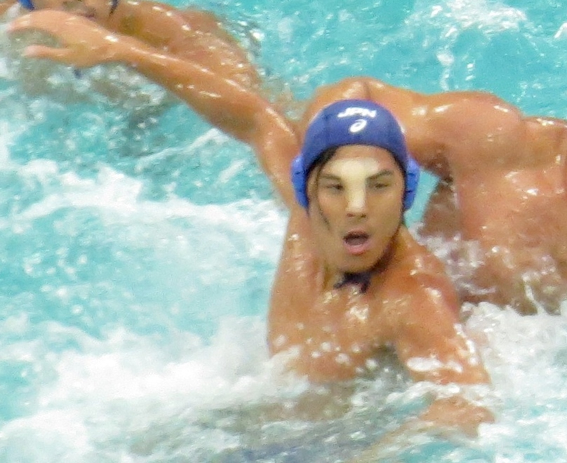 Rio 2016. Polo aquatico. sx50 59